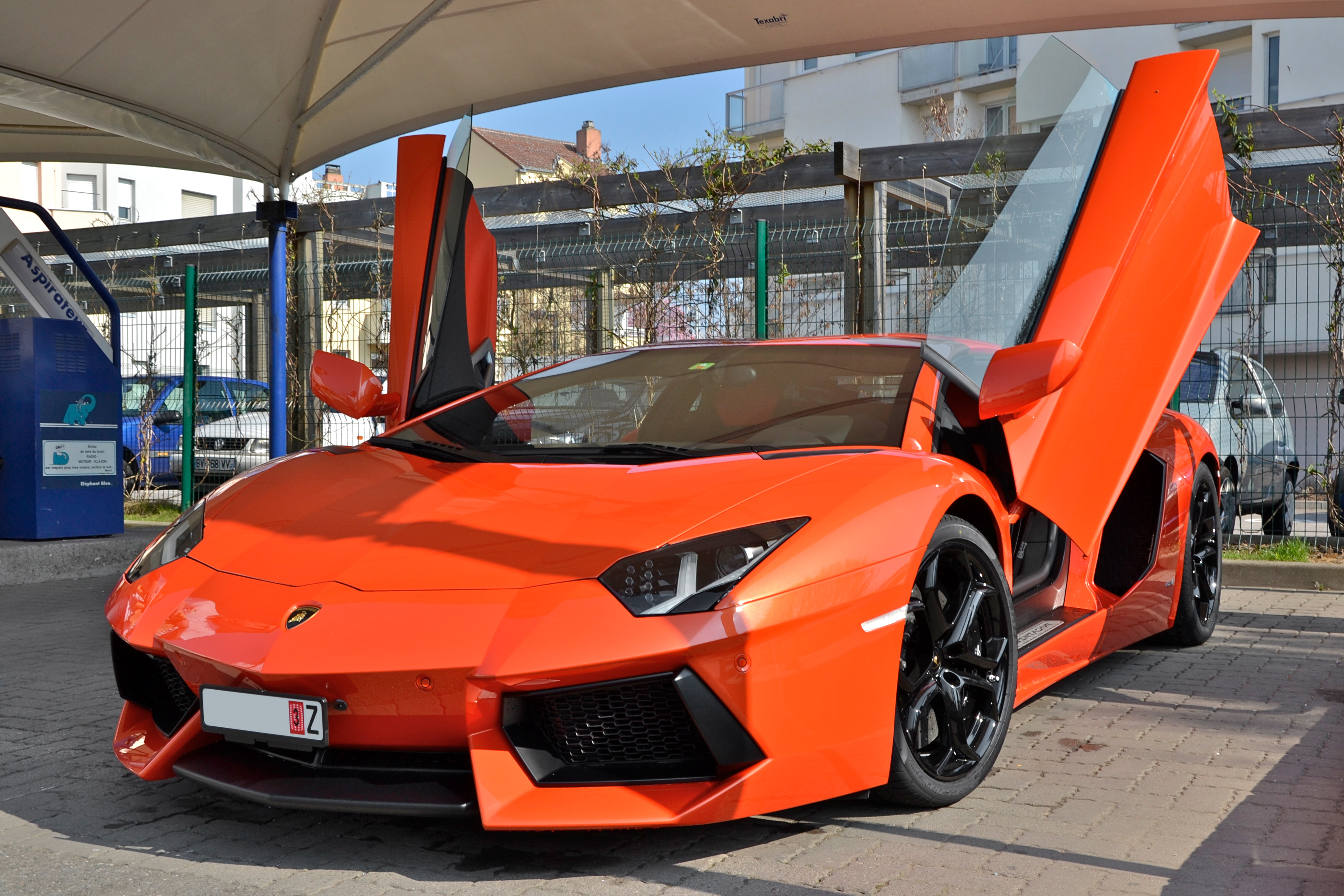 Lamborghini Aventador LP 700-4